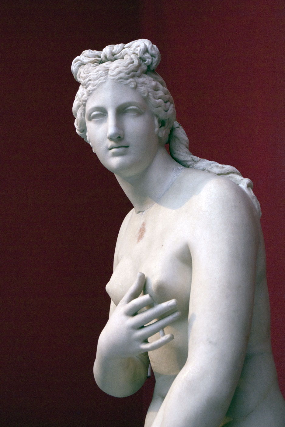 Aphrodite (détail). Copie de l'époque hellénistique. Musée national archéologique d'Athènes.